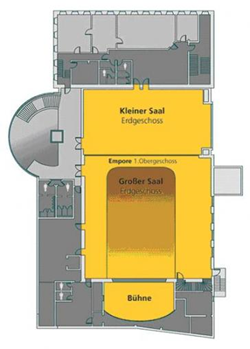 Das Bild zeigt den Grundriss der Stadthalle Limbach-Oberfrohna